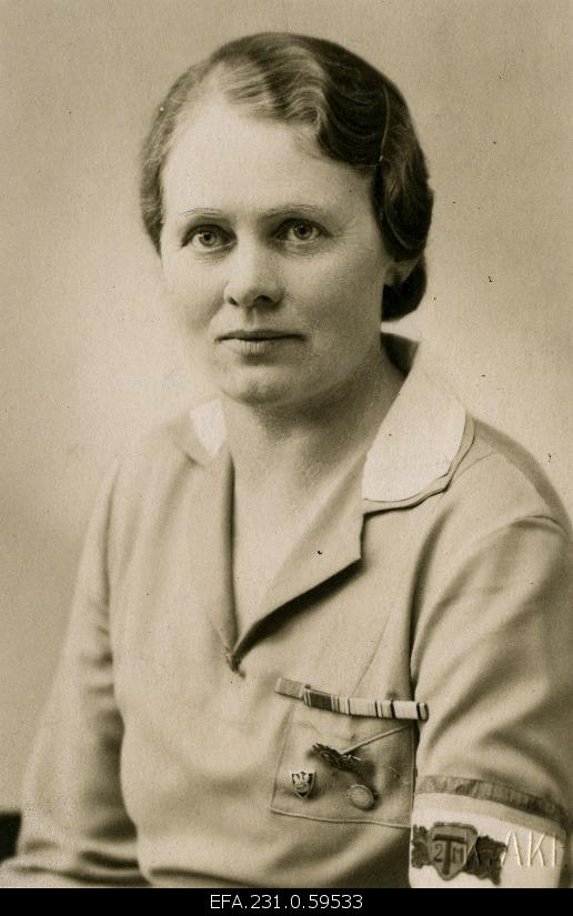 Naiskodukaitse Keskjuhatuse liige ja toitlustusvanem Alice Kuperjanov